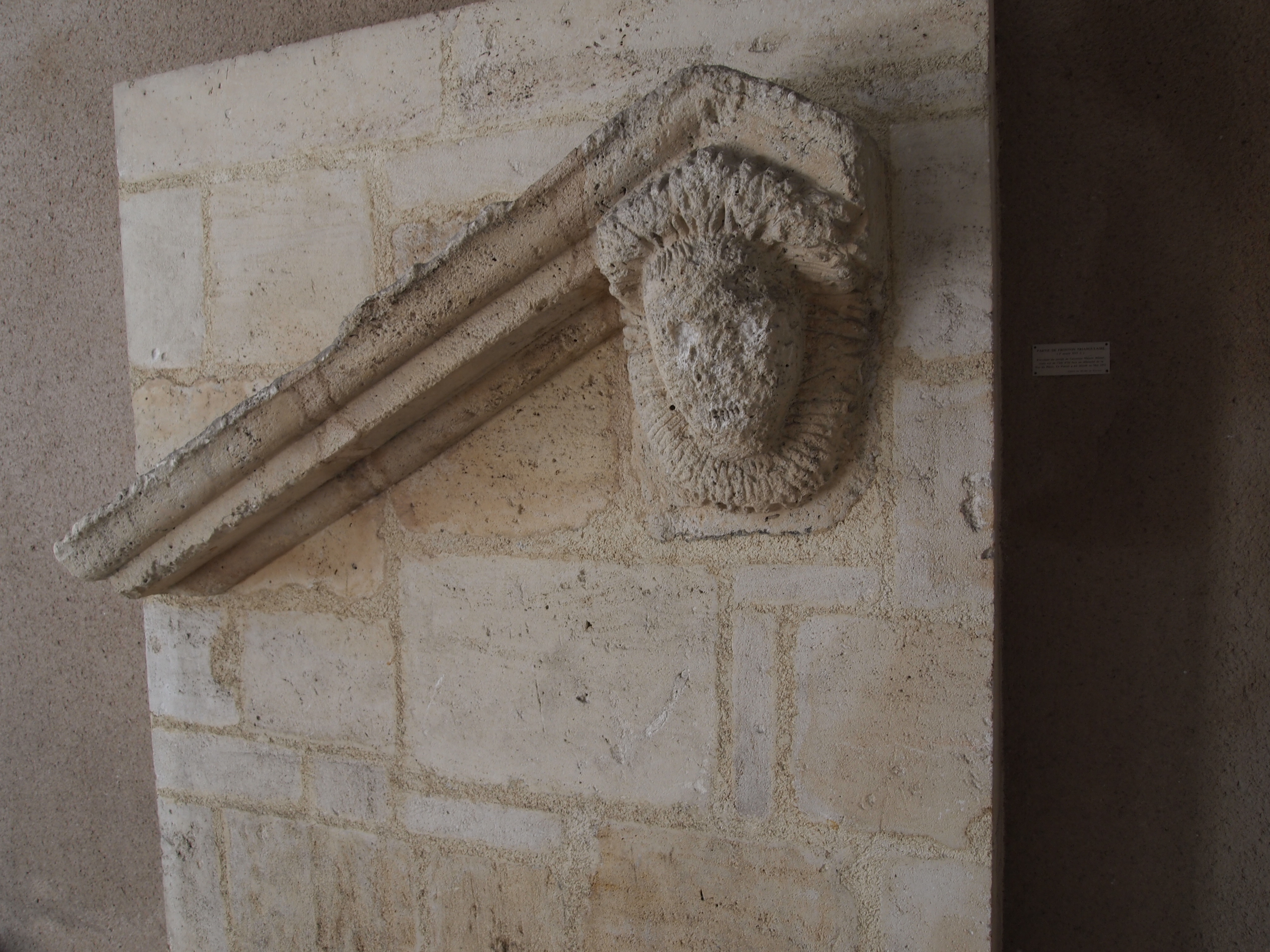 Hôtel Allenet à Cognac, fronton de la porte démonté et exposé au couvent des Récollets